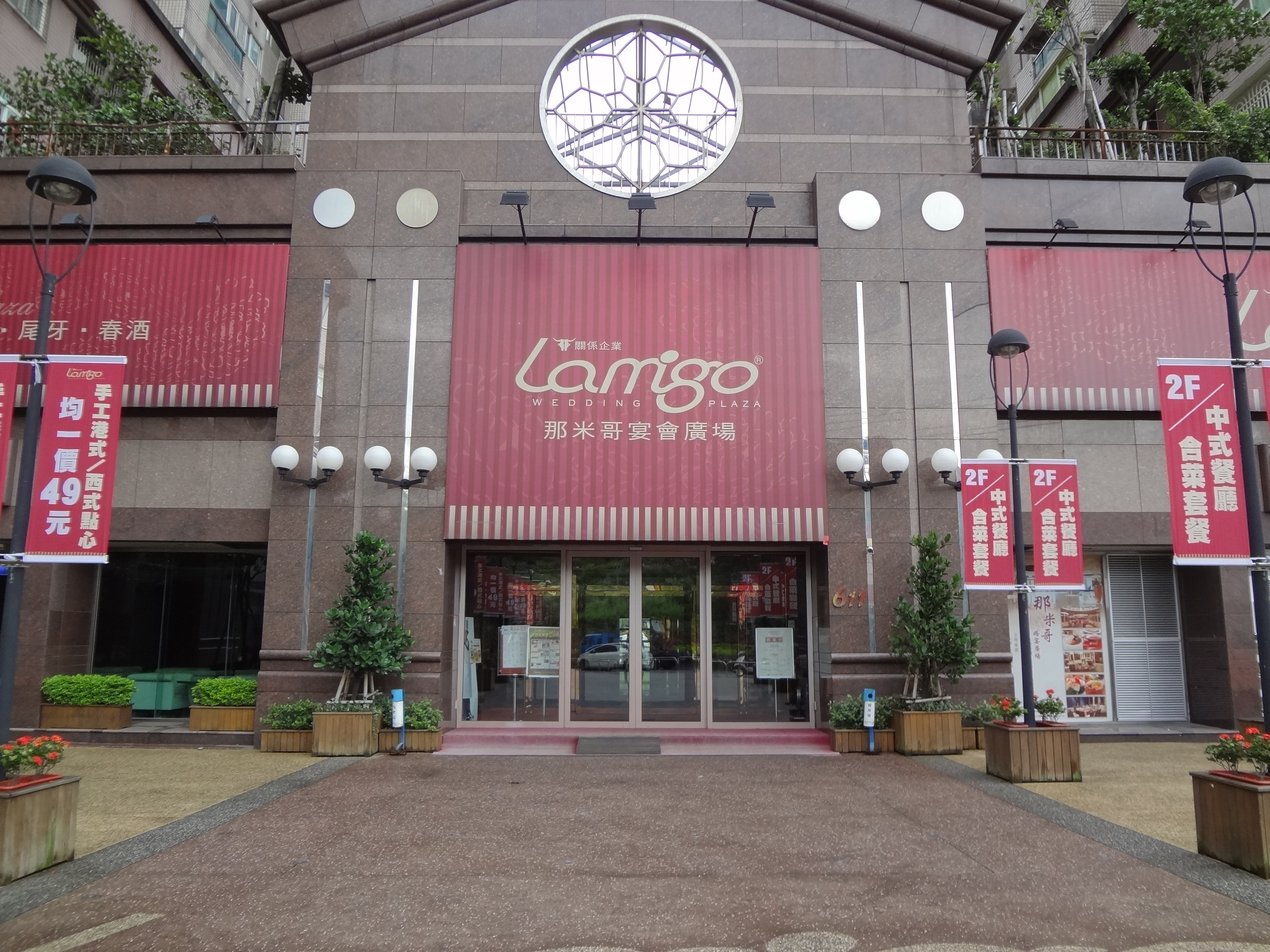 中文（台灣）: 那米哥宴會廣場汐止店，地址：新北市汐止區大同路三段611號1至2樓（摩天鎮）。